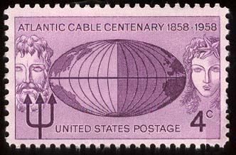 US postage stamp, 1958.